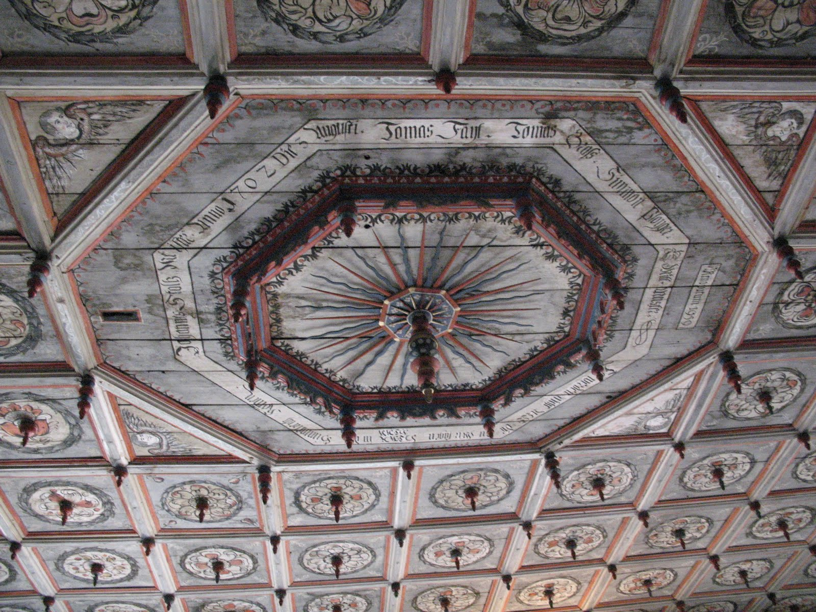 Kassettendecke der Evangelischen Kirche in Codlea / Zeiden, Rumänien.